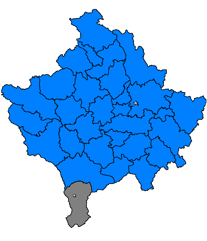 Dragaš